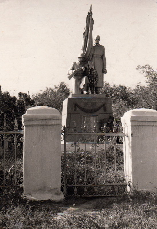 Памятник на братской могиле хутора Весёлый Веселовского района Ростовской области, 1970-е годы